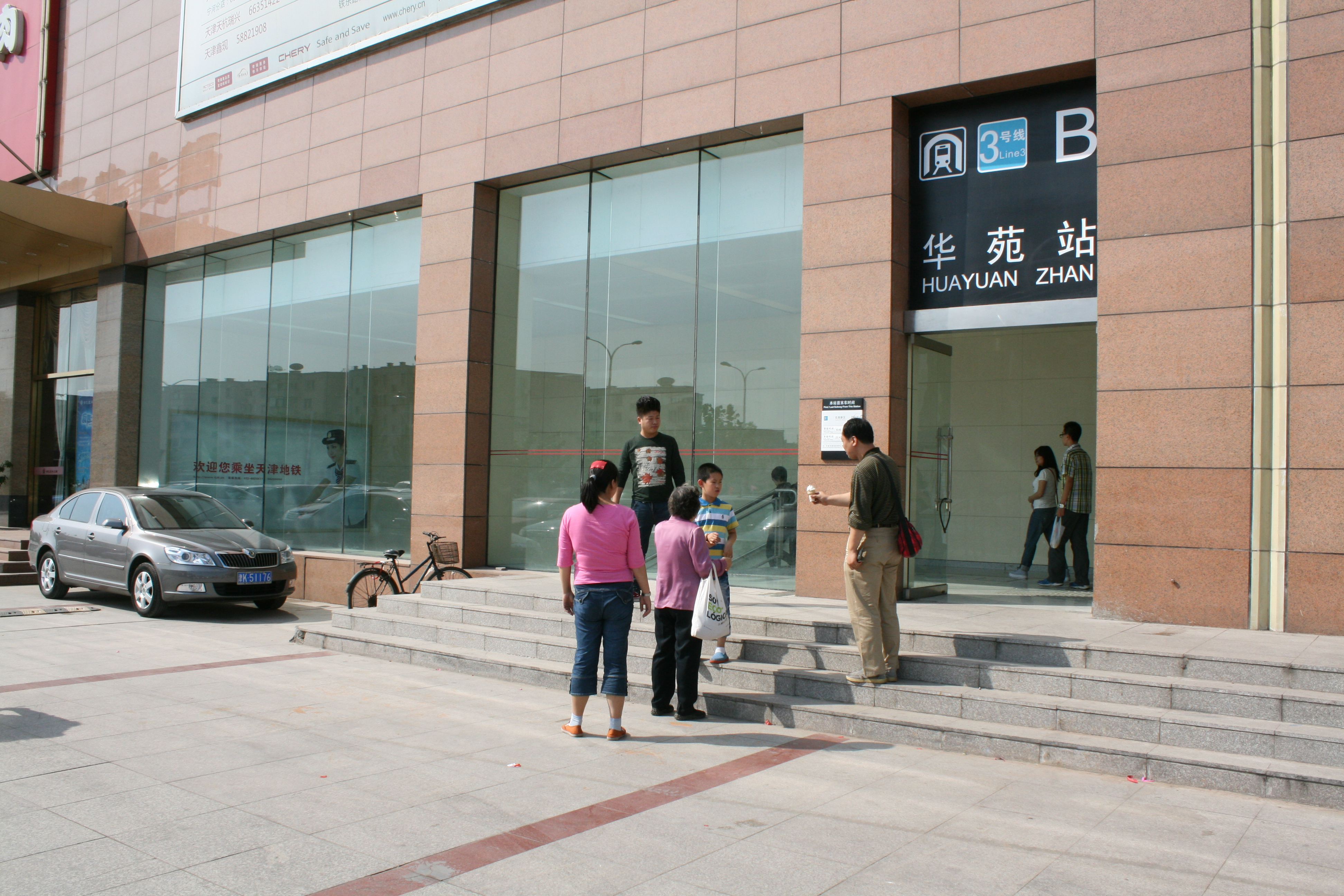 天津地鐵三號線華苑站B出口 0001